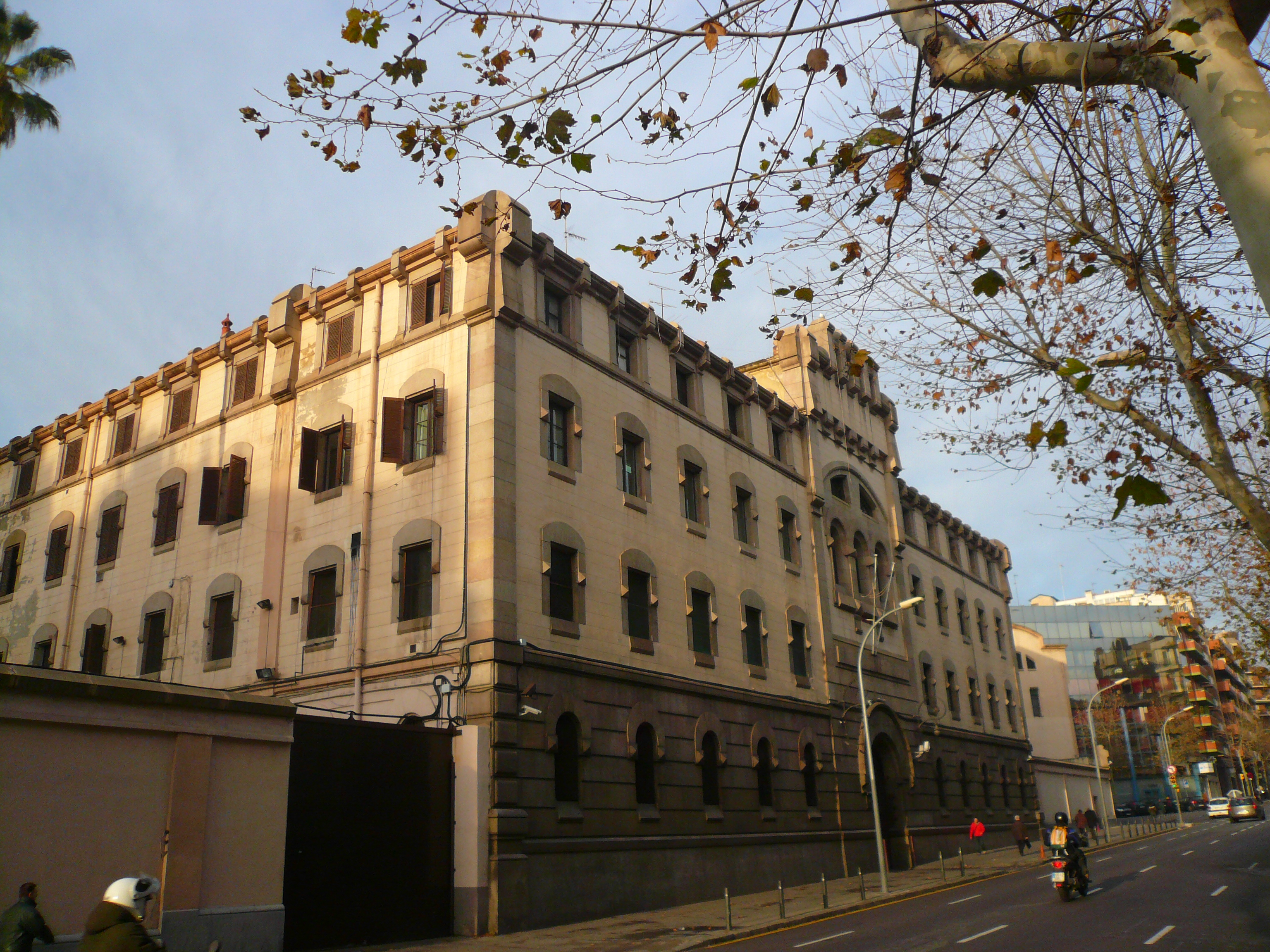 Presó Model. C. Entença, 155 (Barcelona). Object location41° 23′ 00.54″ N, 2° 08′ 43.41″ E